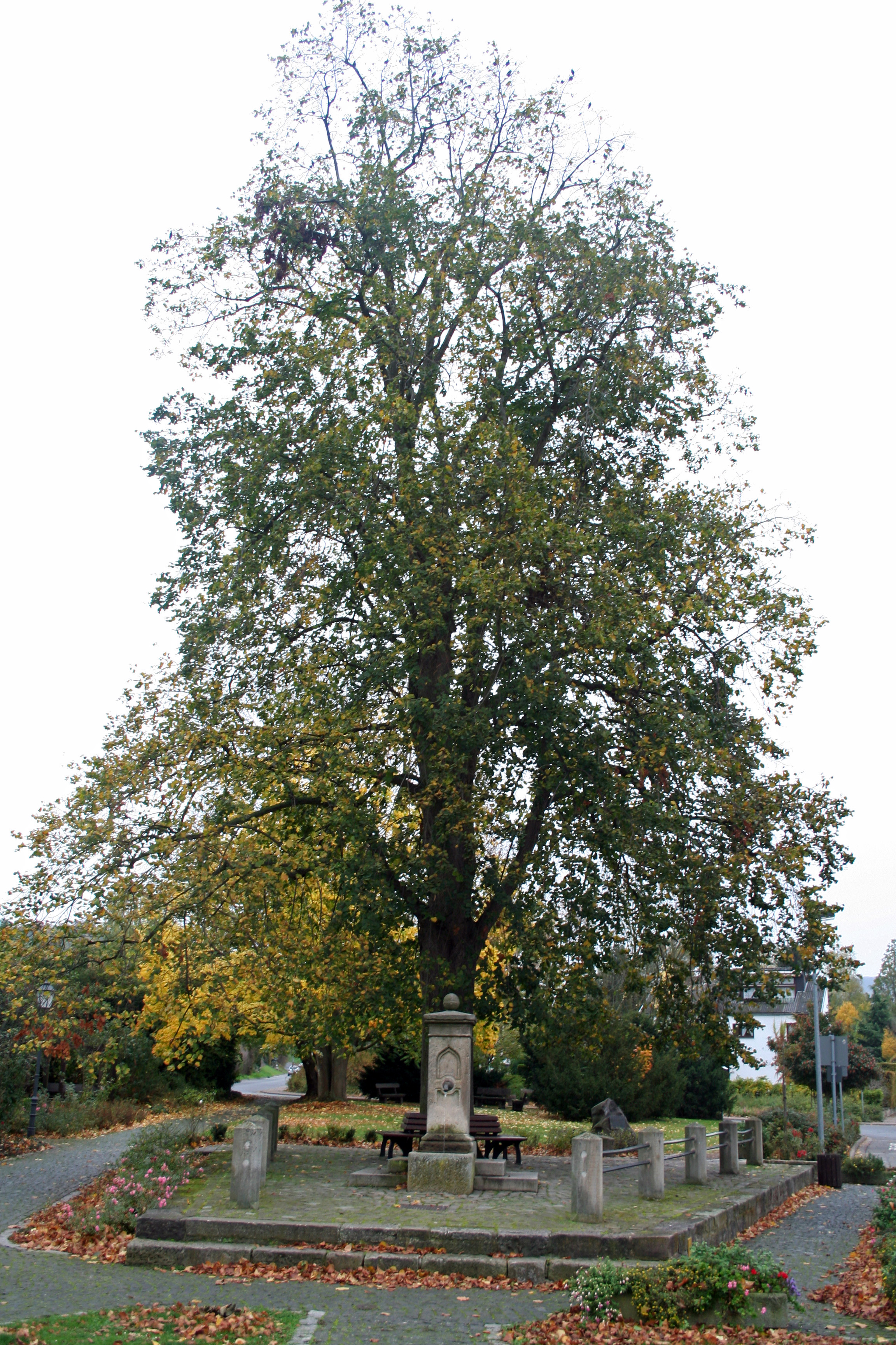 Der "Brunnen vor dem Tore" in Allendorf (Bad Sooden-Allendorf), bekannt aus dem gleichnamigen Volklied "Am Brunnen vor dem Tore".